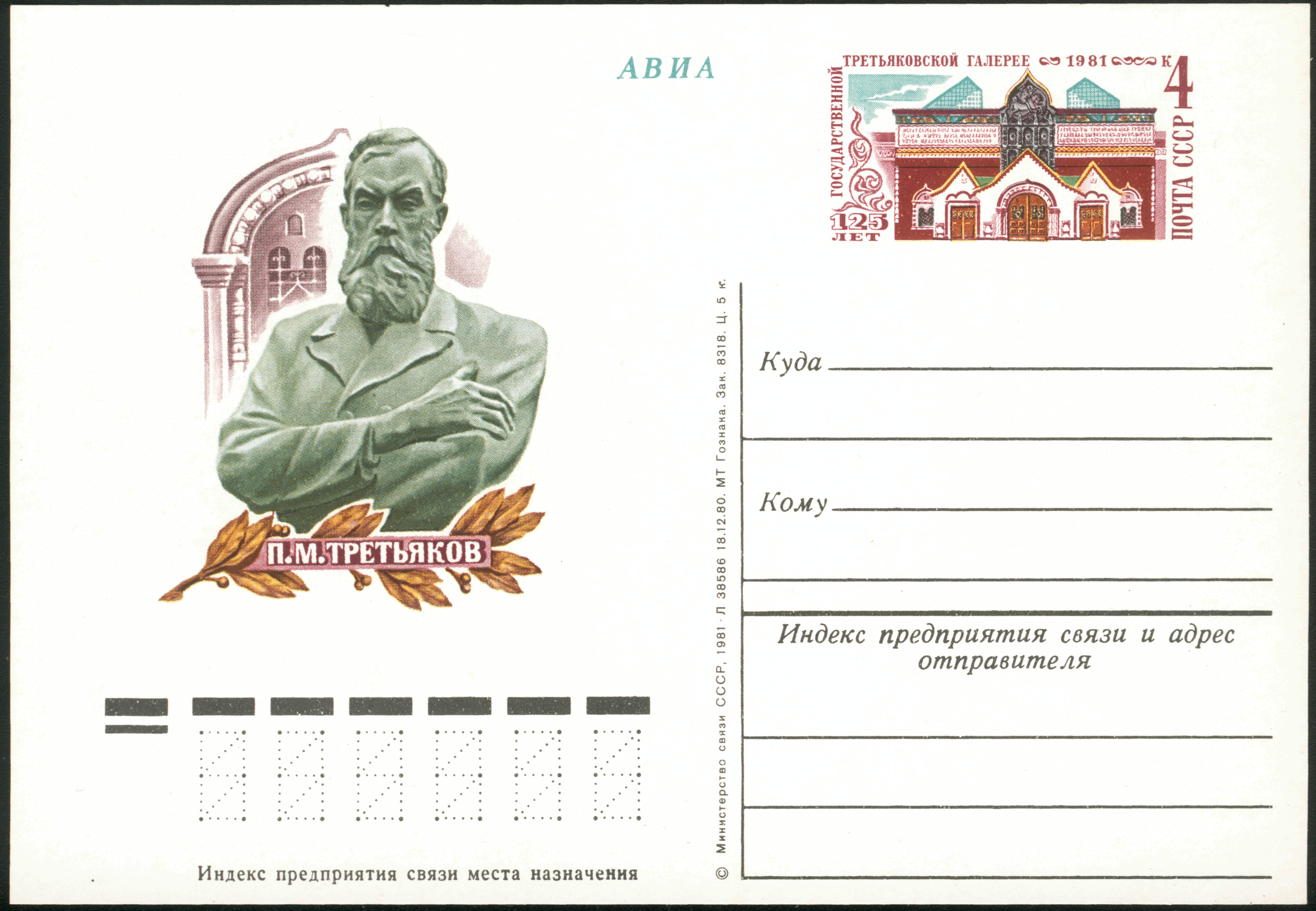 Tretyakov, USSR original stamp, 1981 125 лет Третьяковской галерее. Павел Третьяков. Односторонняя почтовая карточка СССР с оригинальной маркой. 1981 г. Тираж не указан.